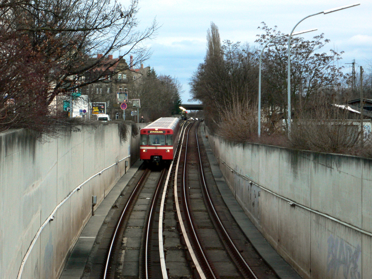 U-Bahn Nürnberg, Streckenabschnitt Stadtgrenze–Jakobinenstraße mit anfahrendem DT1